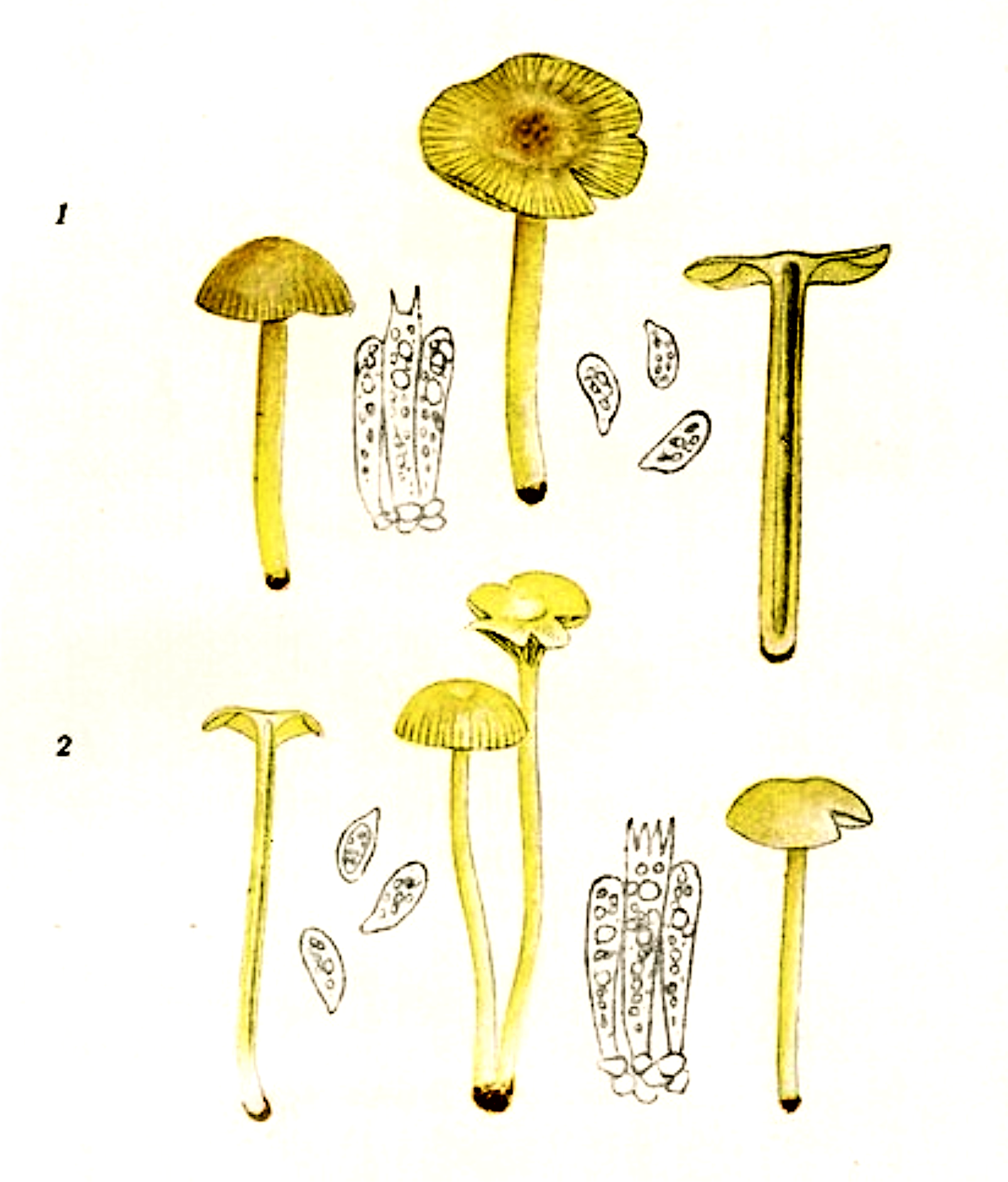 Giacomo Bresadola: 1. Hygrophorus chlorophanus (Fr.), 1821), heute Hygrocybe chlorophana (Fr.) Wünsche (1877) 2. Hygrophorus vitellinus (Fr., 1863), heute Hygrocybe vitellina (Fr.) P.Karst. (1879)